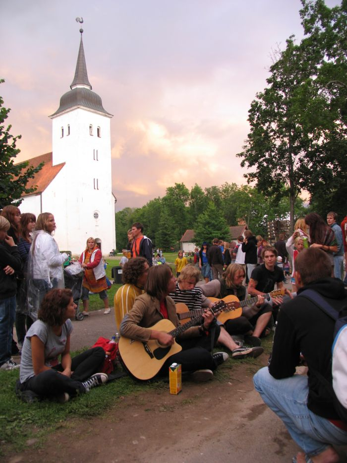 Viljandi jaani kirk, Estonia